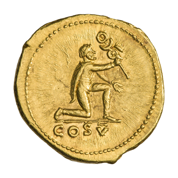 Домициан, цезарь (69—81). Ауреус. Ок. 77—78 гг. Чеканка в правление Веспасиана. Рим. Реверс. Пленник, стоящий на коленях, вправо; отдает вексиллум (штандарт). Внизу надпись COS V.